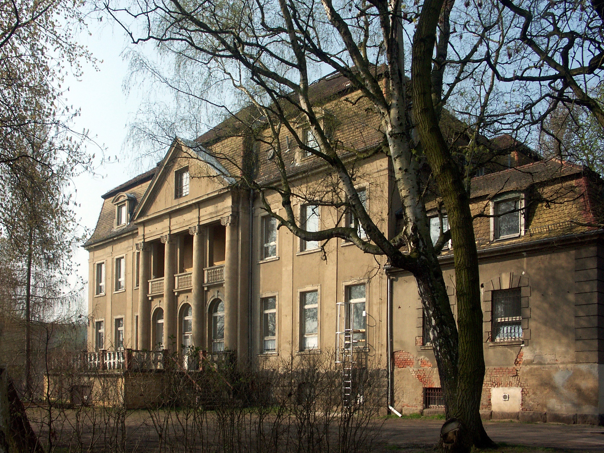 Gaschwitz - Das Neue Herrenhaus von 1905, Zustand 2009